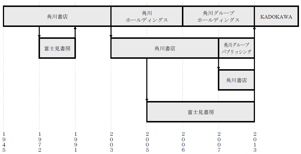 角川書店, 角川ホールディングス, 角川グループホールディングス, KADOKAWA, 富士見書房, 角川グループパブリッシング の統廃合を時系列順に整理した図